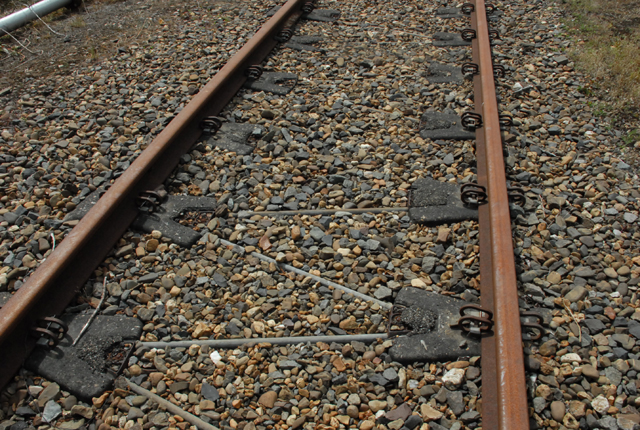 NS dwarsliggers bestaande uit betonnen koppen en Zigzag verbindingen op het rangeerterrein te Veendam. Dit spoor werd in 2010 verwijderd.